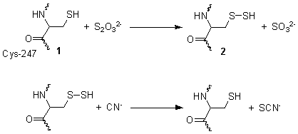 Bildbeschreibung: Katalysemechanismus Rhodanase. Quelle: selbst erstellt. Fotograf/Zeichner: Minutemen Datum: 05. Mai 2006